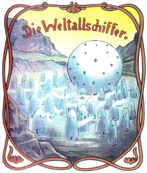 Die Weltallschiffer. Titelbild des Heftromans.